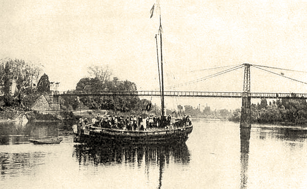 Gabarre pour transport de tonneaux et de passagers à Pessac, sur la Dordogne